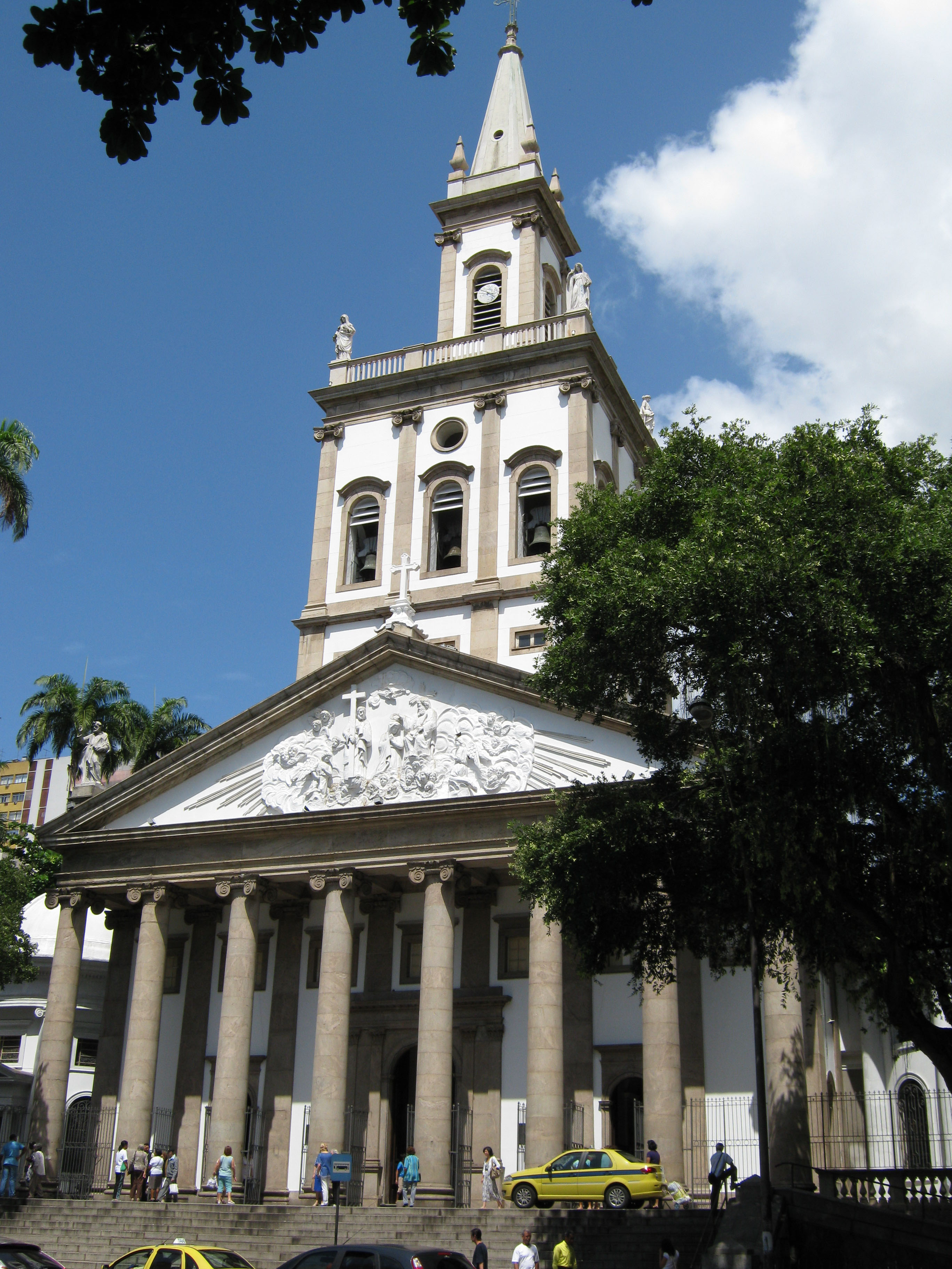 Igreja de Nossa Senhora da Glória no Largo do Machado